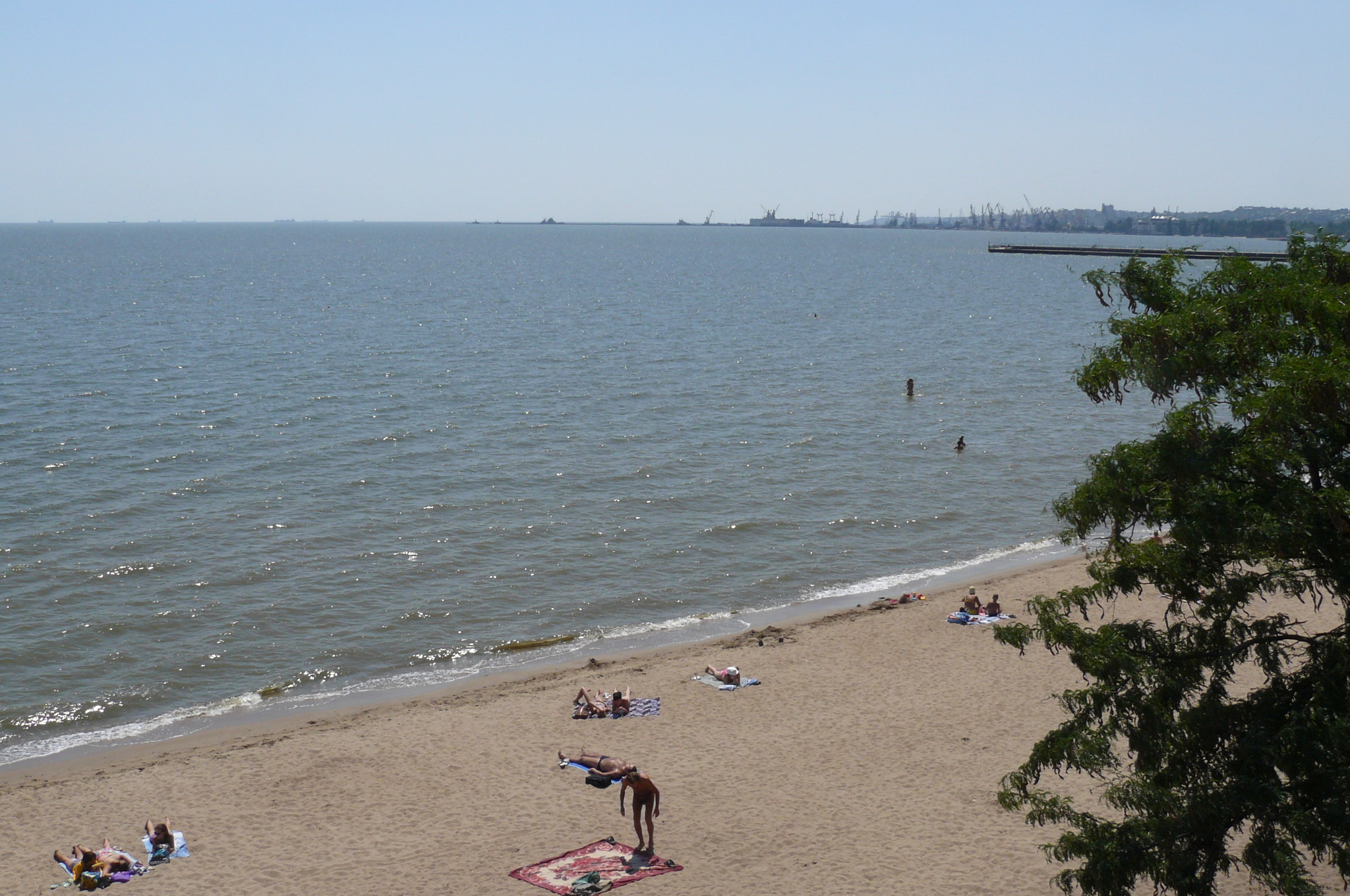 Mariupol - beatch. Juni 2012.